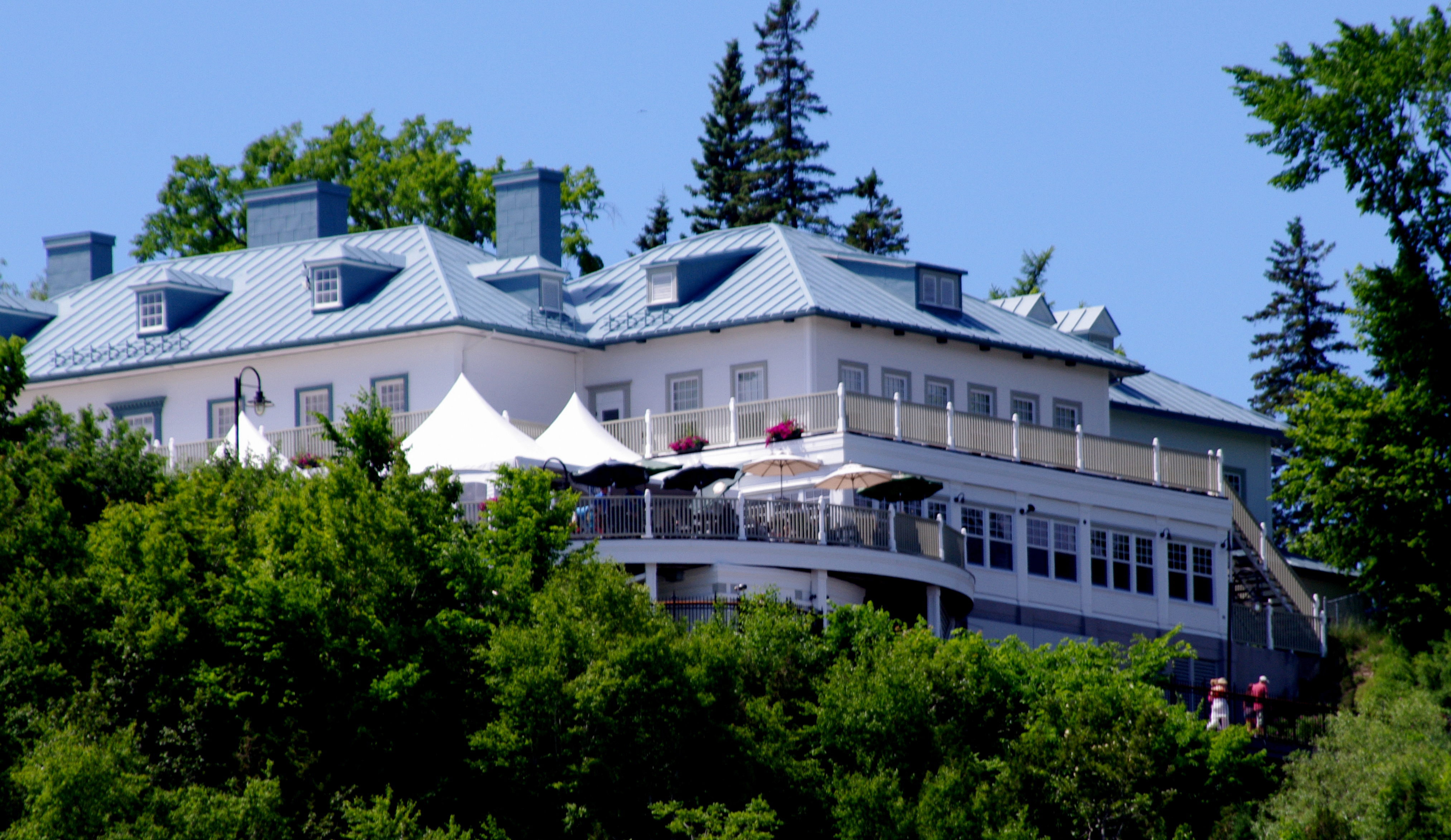 Image de la ville de Québec provenant du concours Wikipédia prend Québec.